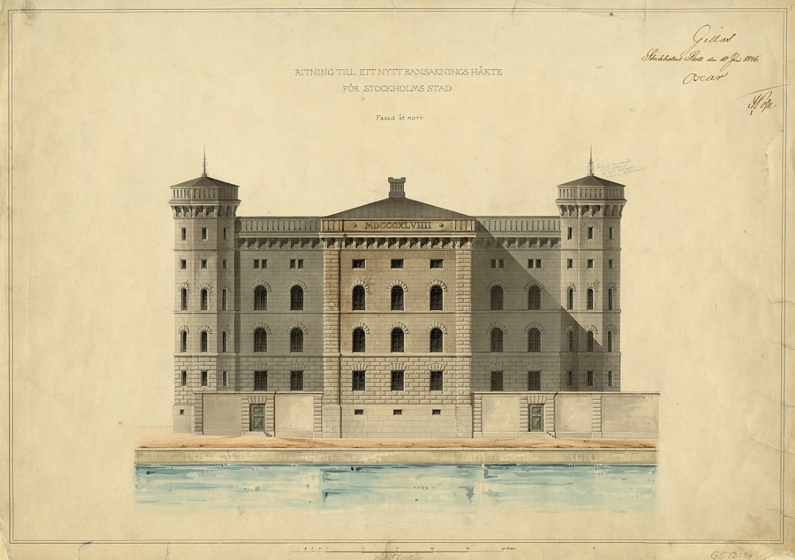 Rannsakningsfängelset vid Myntgatan, fasadritning Objektidentitet:SE/SSA/0085/GS/12:34